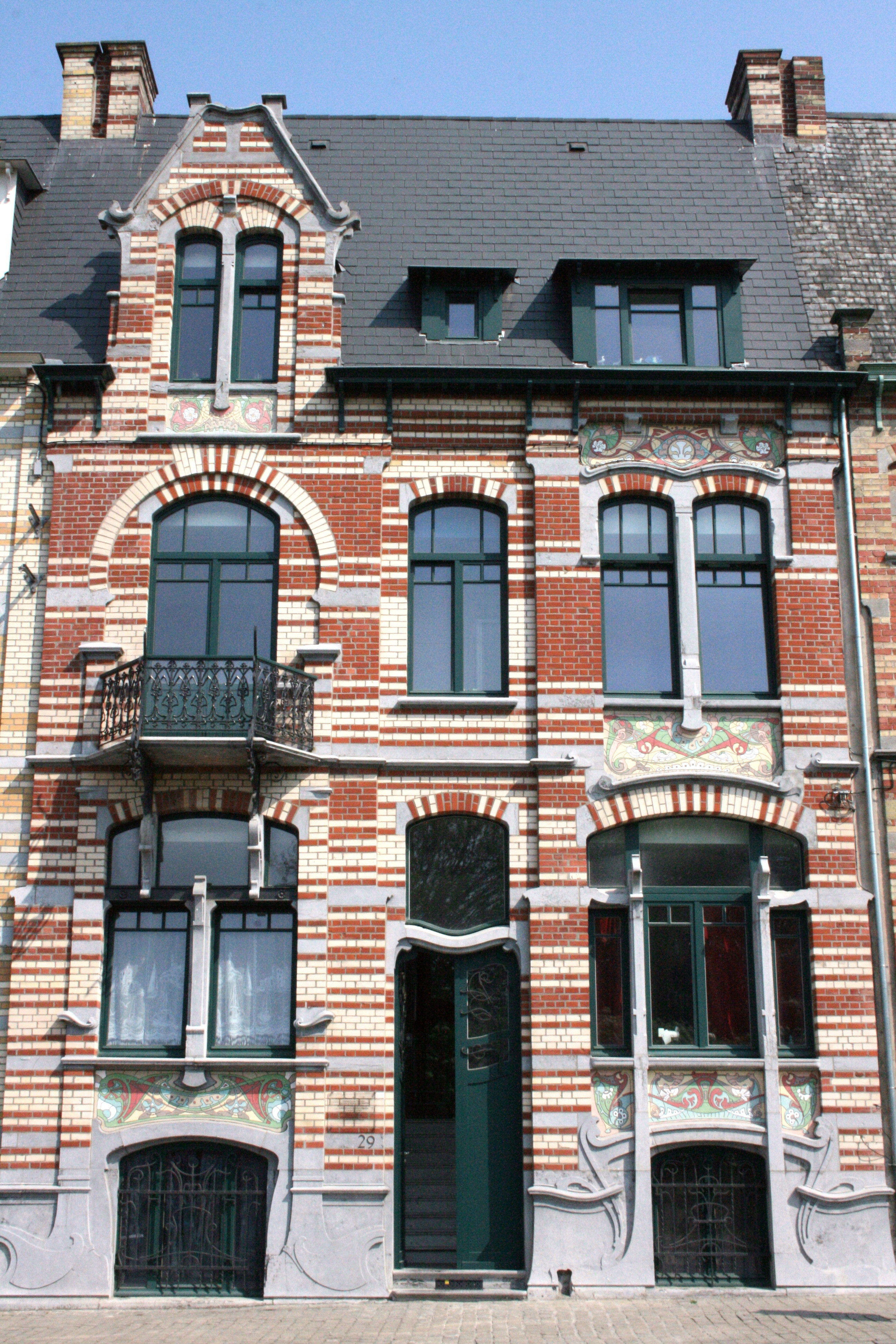 Avenue Van Cutsem 29, Tournai, belgique. Art Nouveau. Oeuvre de Gustave Strauven (1904)